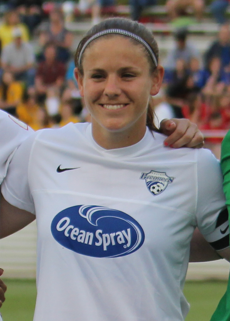 2013-05-11 Breakers-32